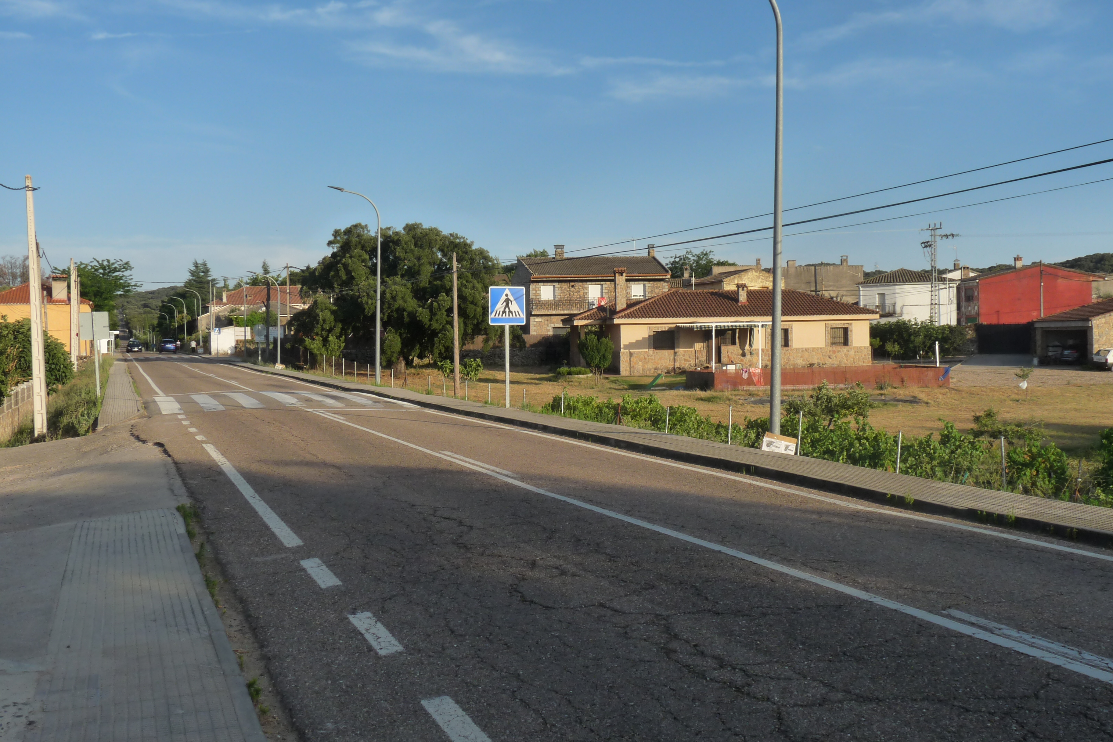 Vista de Sotillo de las Palomas con CM5100 en primer plano.